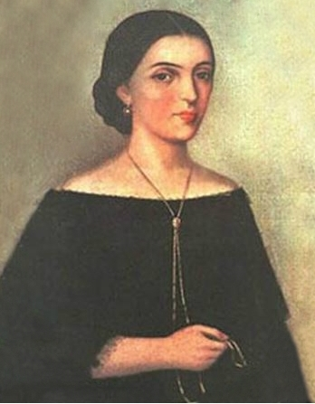 Retrato de doña Manuela Sáenz y Aizpuru, autor desconocido, circa 1820.